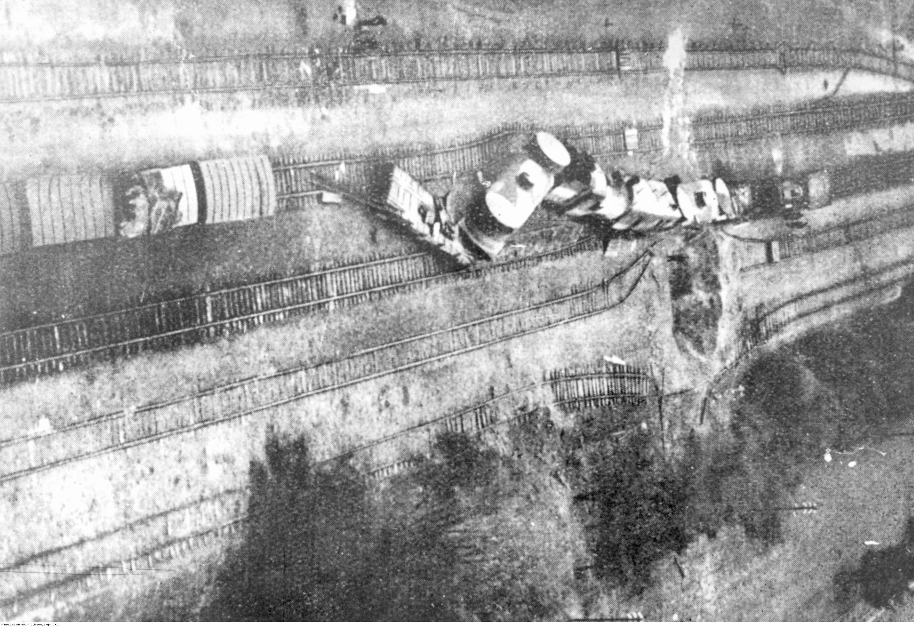 Zbombardowany pociąg pancerny nr 13 "gen. Sosnkowski" na stacji kolejowej w Łochowie. Fotografia lotnicza.